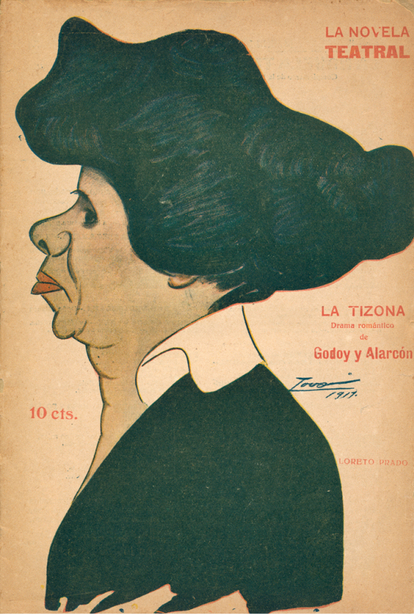 Caricatura de Loreto Prado.